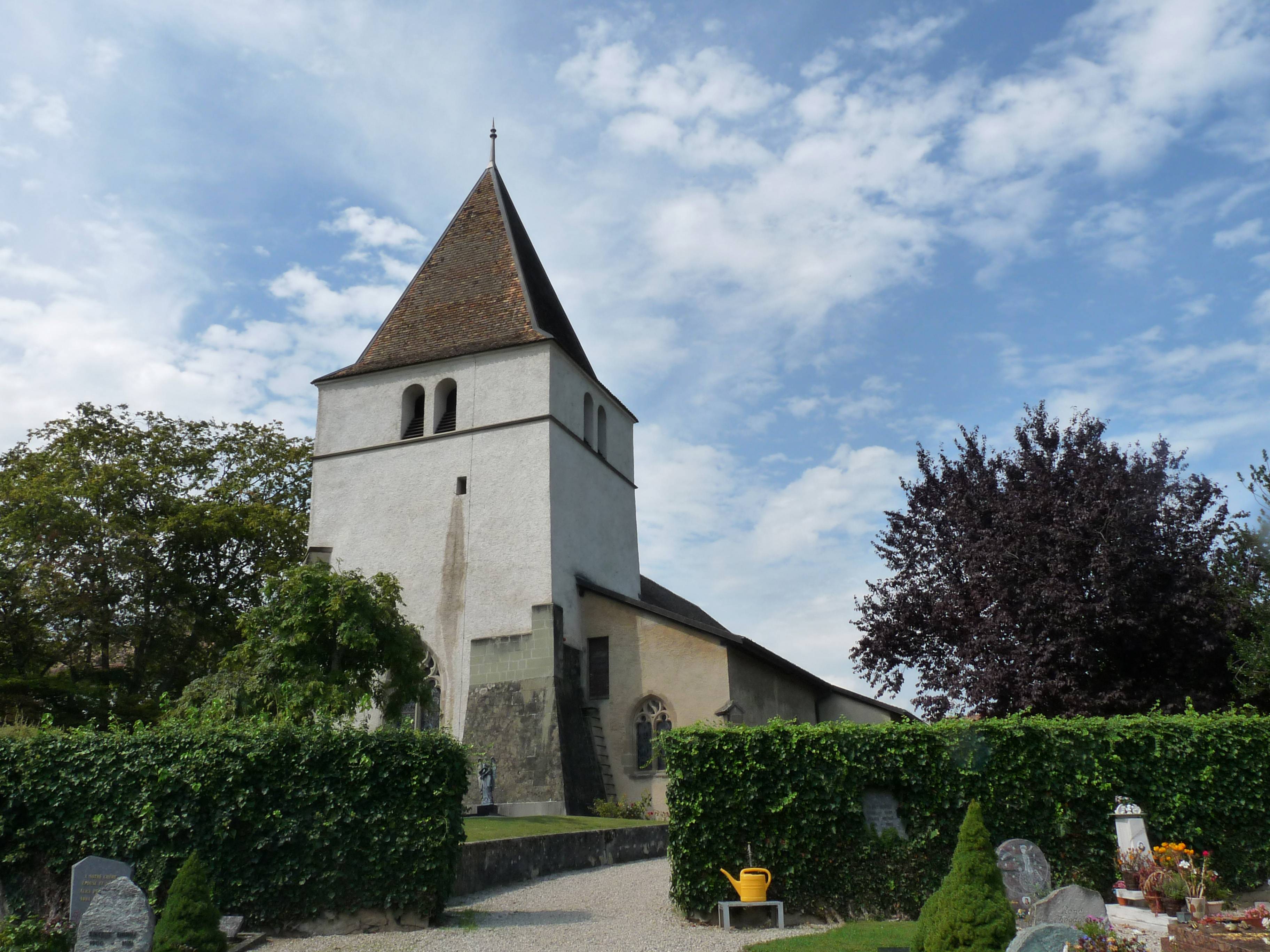 Eglise évangélique réformée Saint-Christophe de Commugny (canton de Vaud, Suisse)